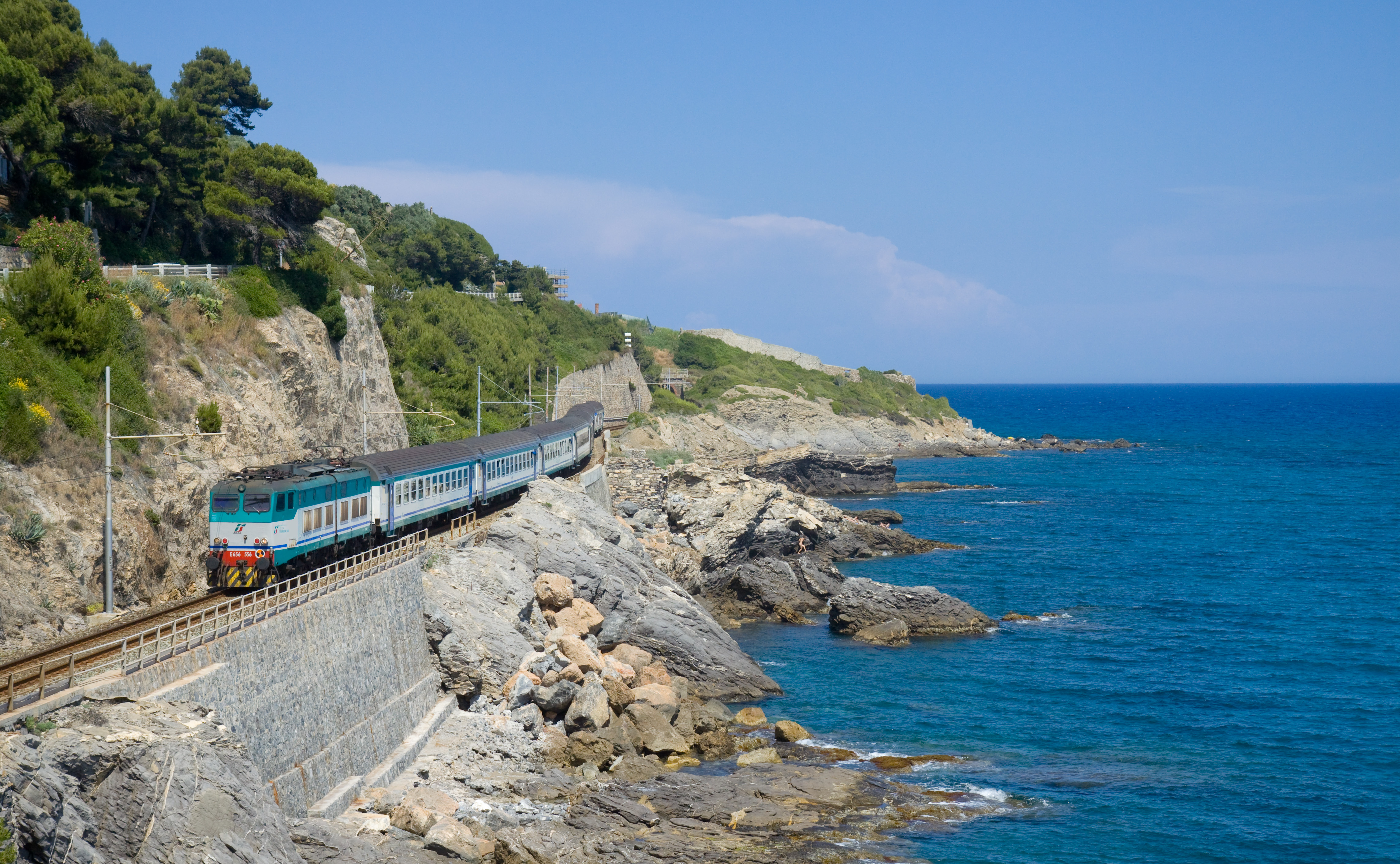 Treno passeggeri in corsa fra Cervo e Andora